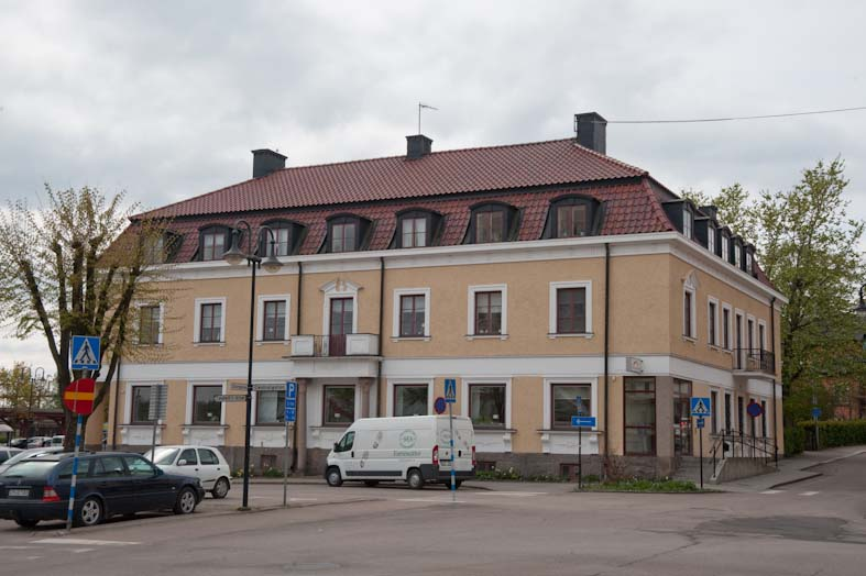 Bankhuset Motiv: Alvesta Kategori: Stadsmiljö, Bank Bankhuset.